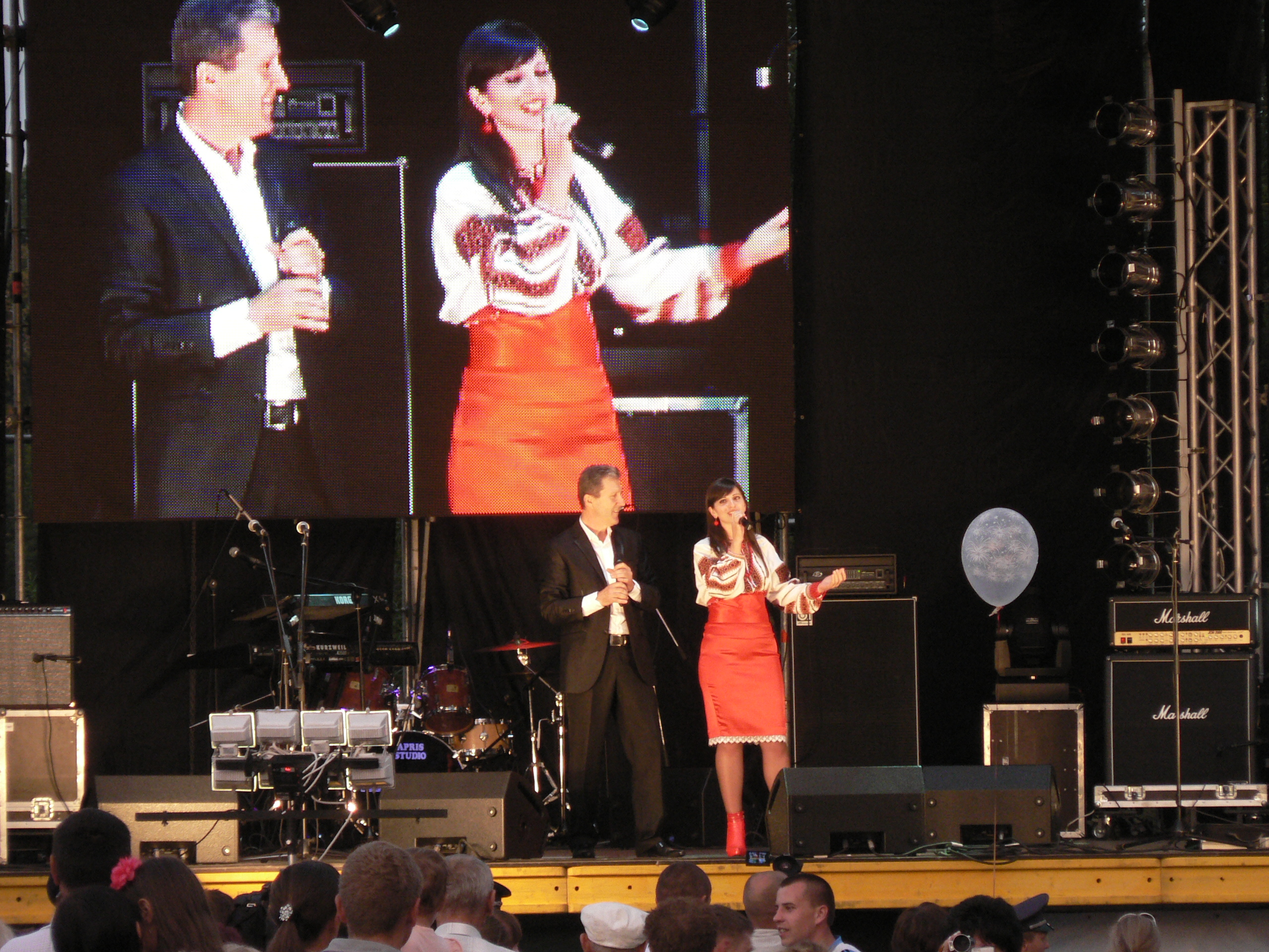 Уродженець села Канави заслужений артист України Микола Янченко на фестивалі "Мамина піч"